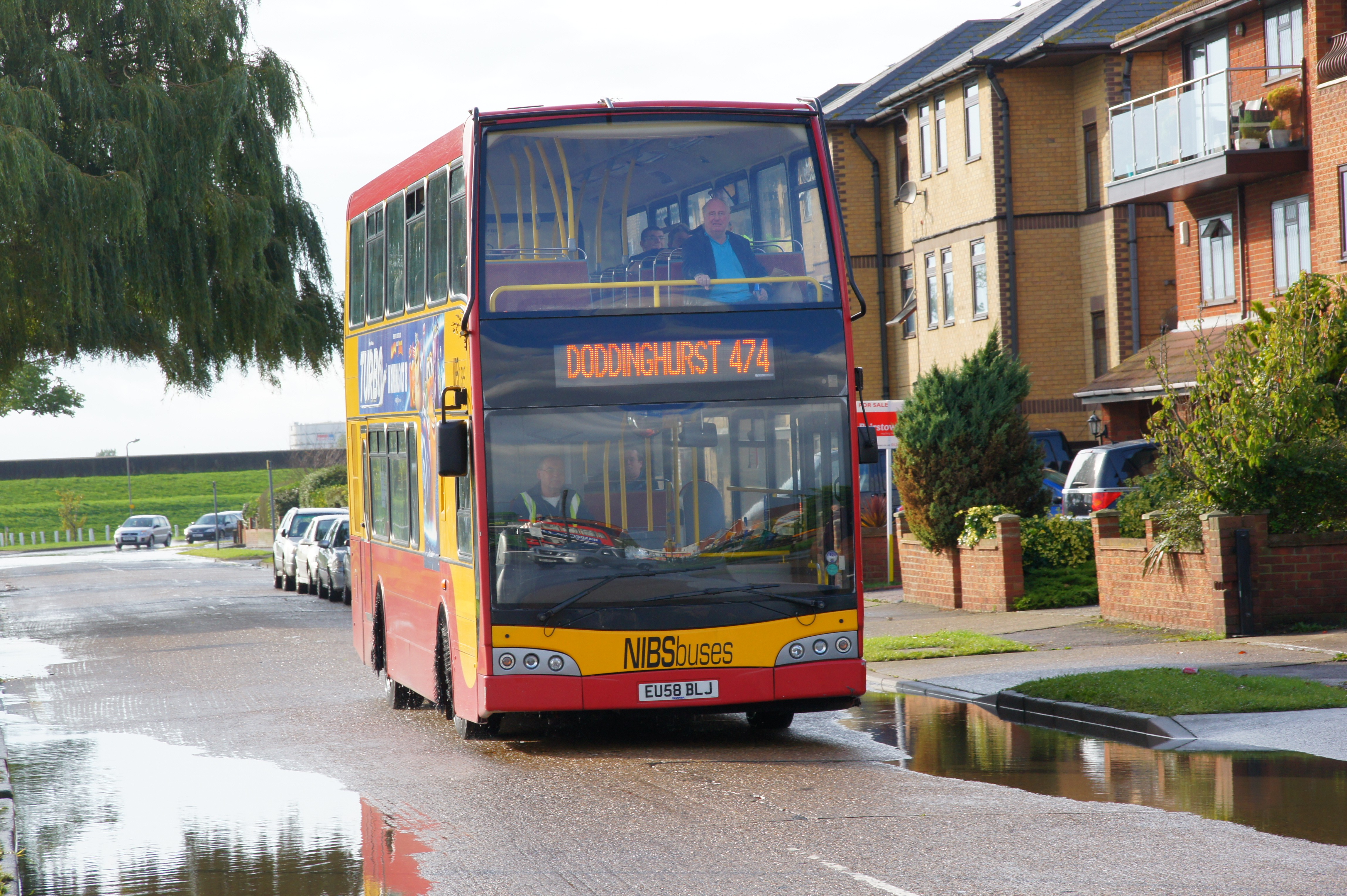 EU58BLJ-1 131013 CPS